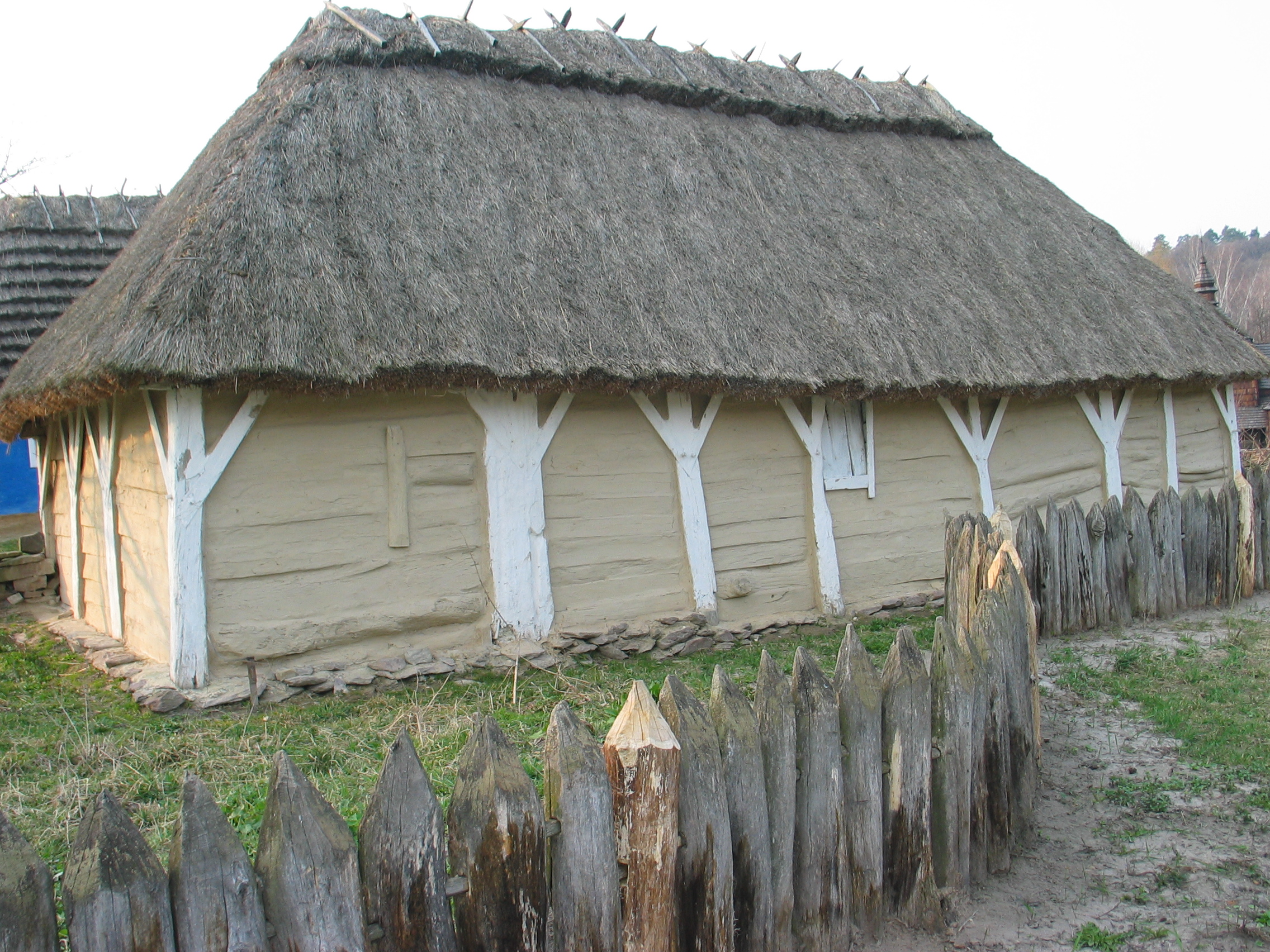 Національний музей народної архітектури і побуту України (с. Пирогів), Київ, Червонопрапорна вул., с. Пирогів